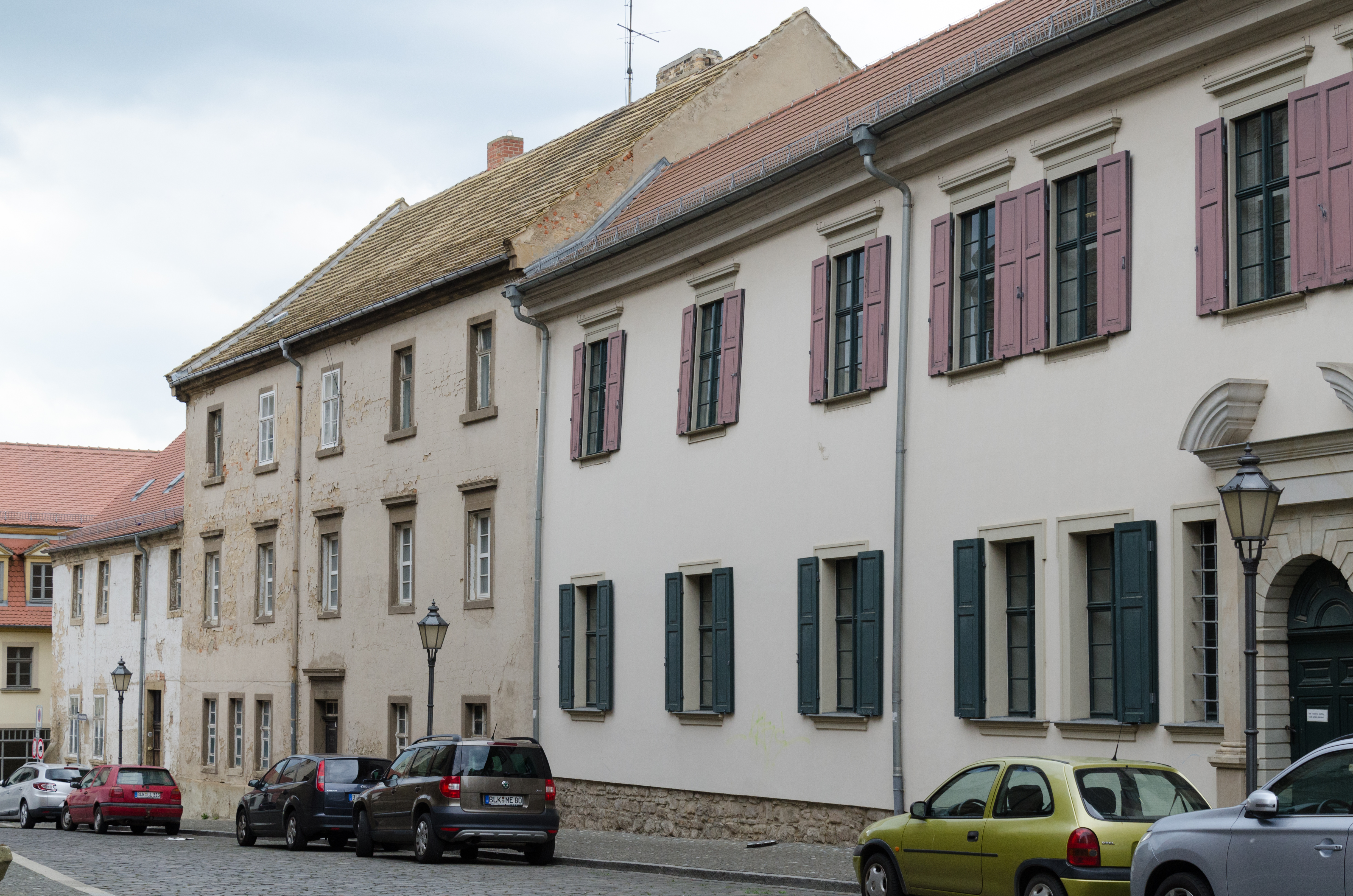 Zeitz, Michaeliskirchhof 9, 8